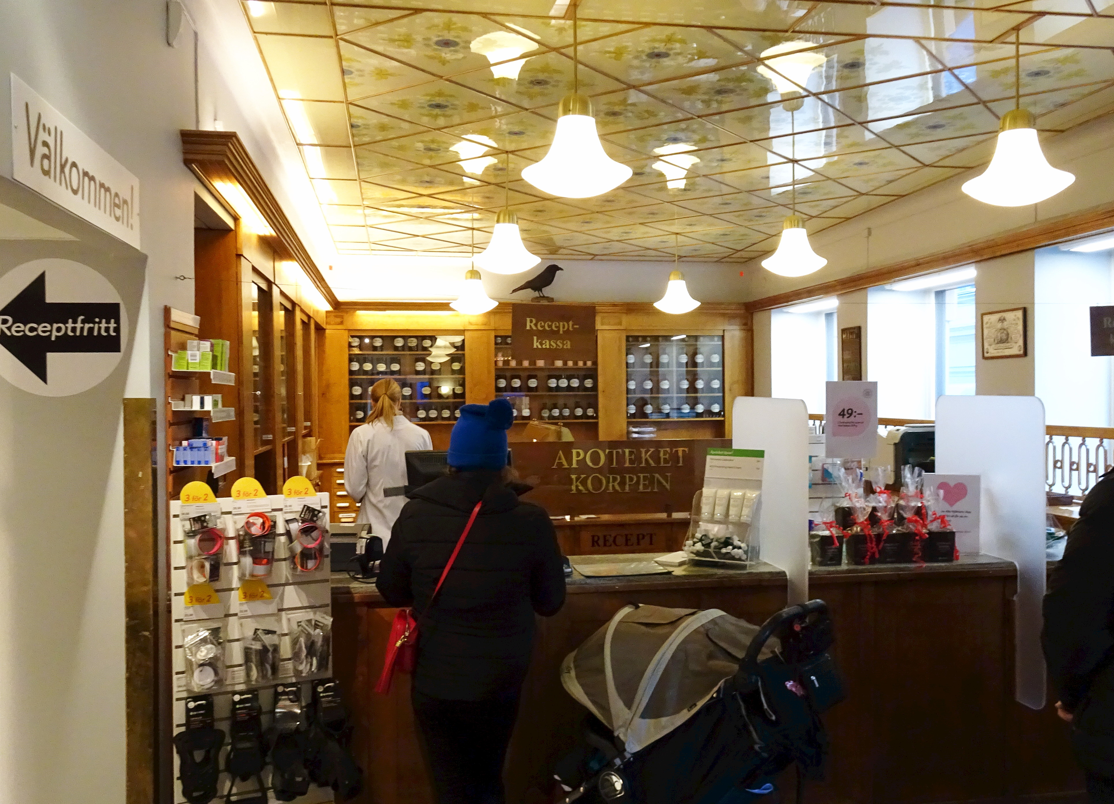 Apoteket Korpen, Västerlånggatan, Gamla stan